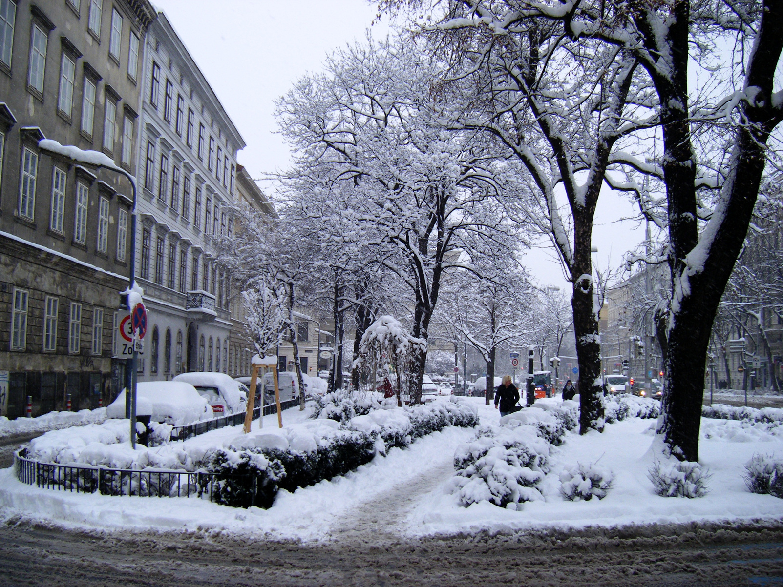 2013 Wien 0045